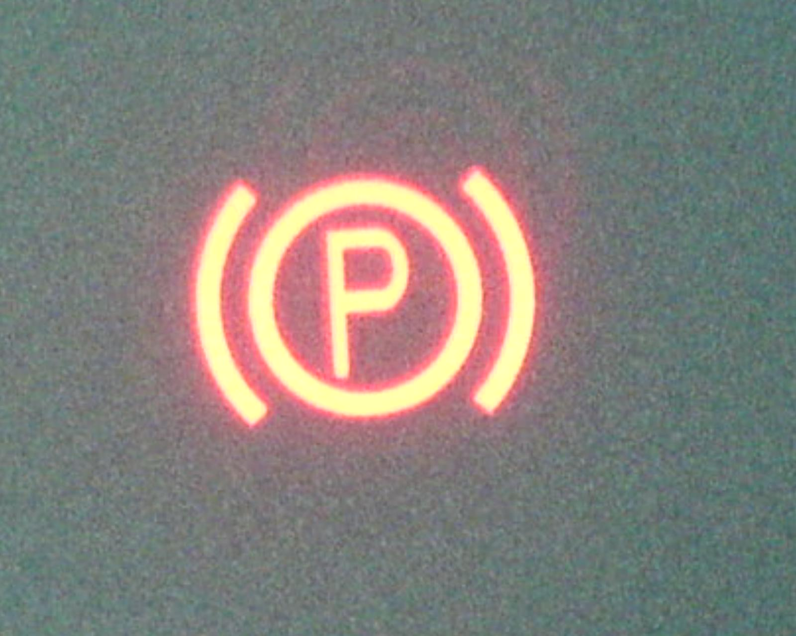 Feststellbremsenleuchte "P" (= Handbremse angezogen/aktiviert)